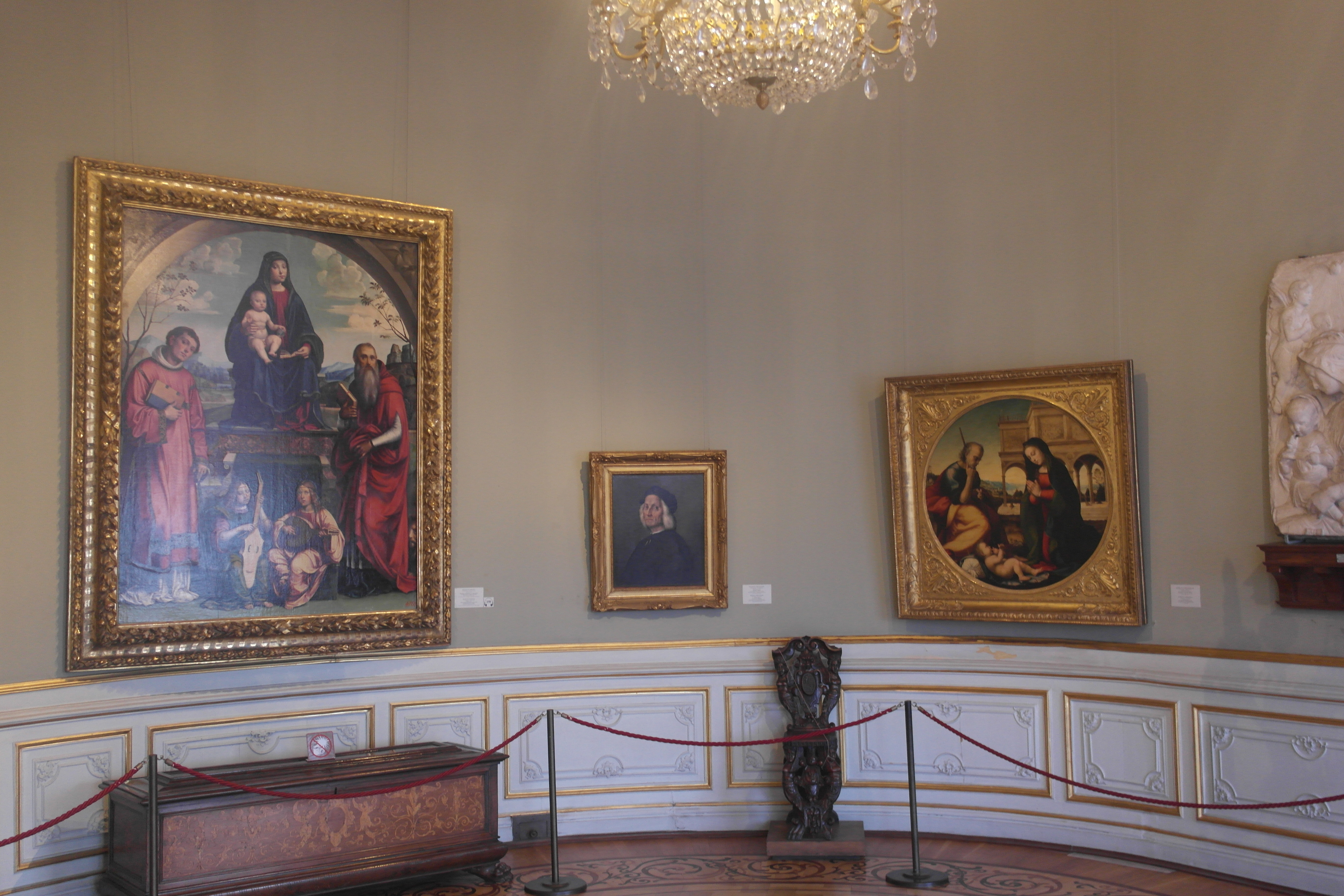 Картины Франческо Франча, Мариотто Альбертинелли и Ридольфо дель Гирландайо